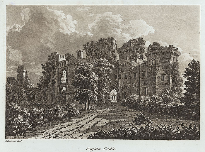 1 print : aquatint (sepia), b&w ; image size 112 x 163 mm., paper size 155 x 230 mm.